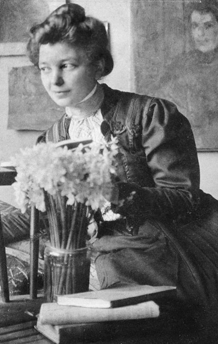 Gertraud Rostosky im Gartensalon auf dem Gutshof Neue Welt in Würzburg